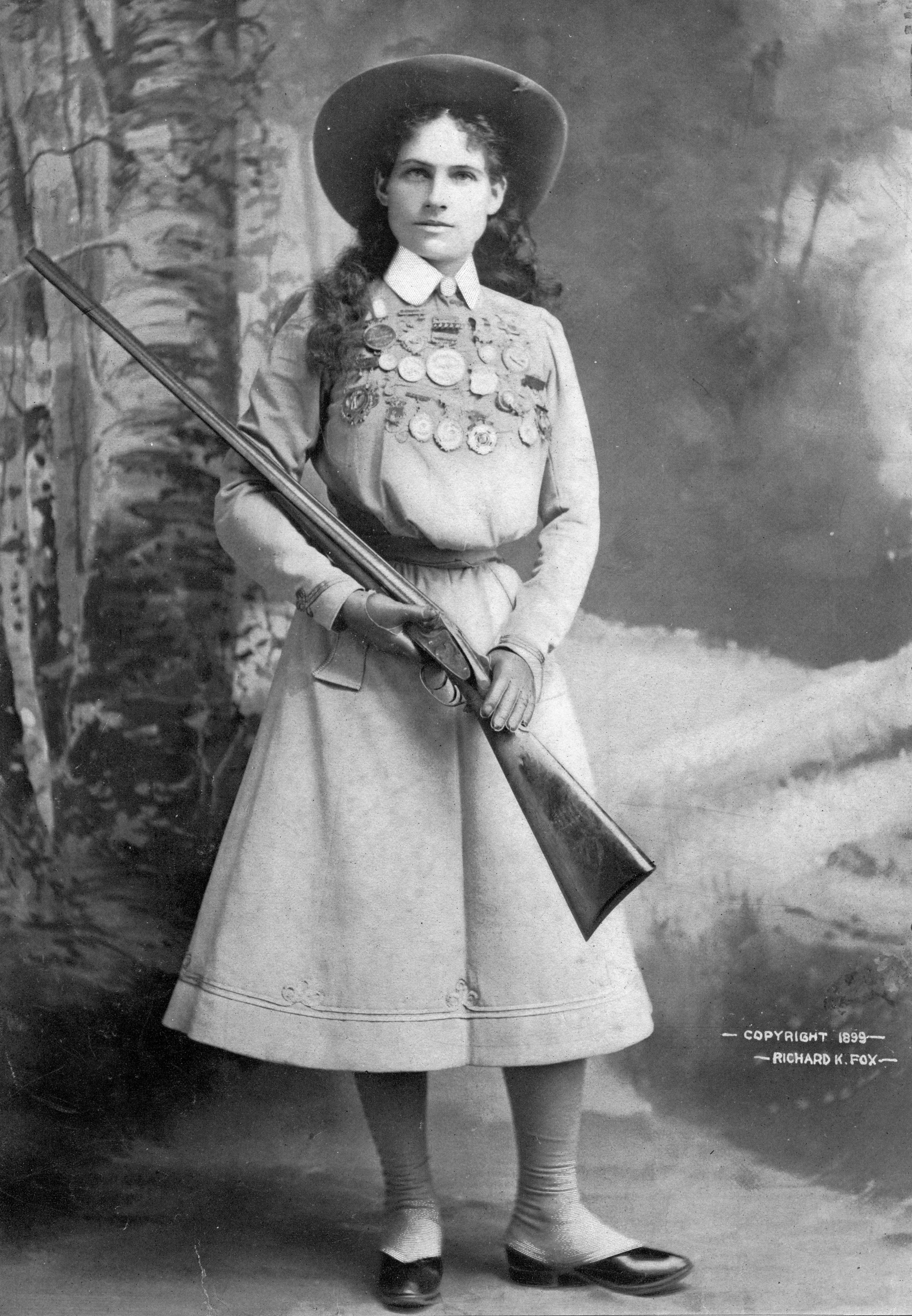 Portrait von Annie Oakley (Kongressbibliothek) Gefunden auf der Seite Weitere Informationen: OAKLEY, ANNIE. Reproduction of photograph. Copyright by Richard K. Fox. Copyrighted 1899. Location: Biographical File Reproduction Number: LC-USZ62-7873 Eine Tiff-Version (1.4MB), ebenfalls unter public domain, kann hier heruntergeladen werden